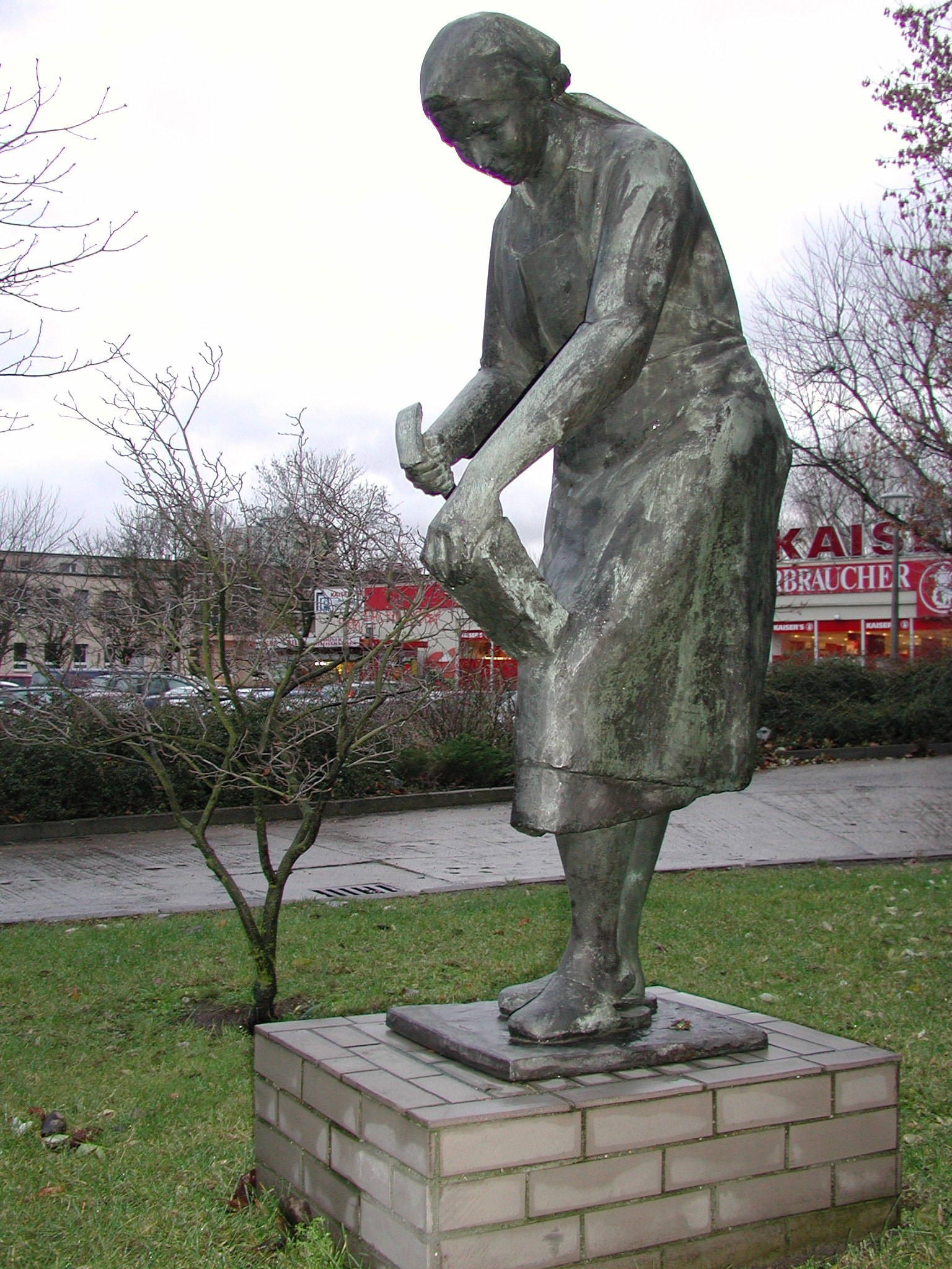 Trümmerfrauen-Denkmal von Gerhard Thieme in Berlin-Johannisthal, Sterndamm